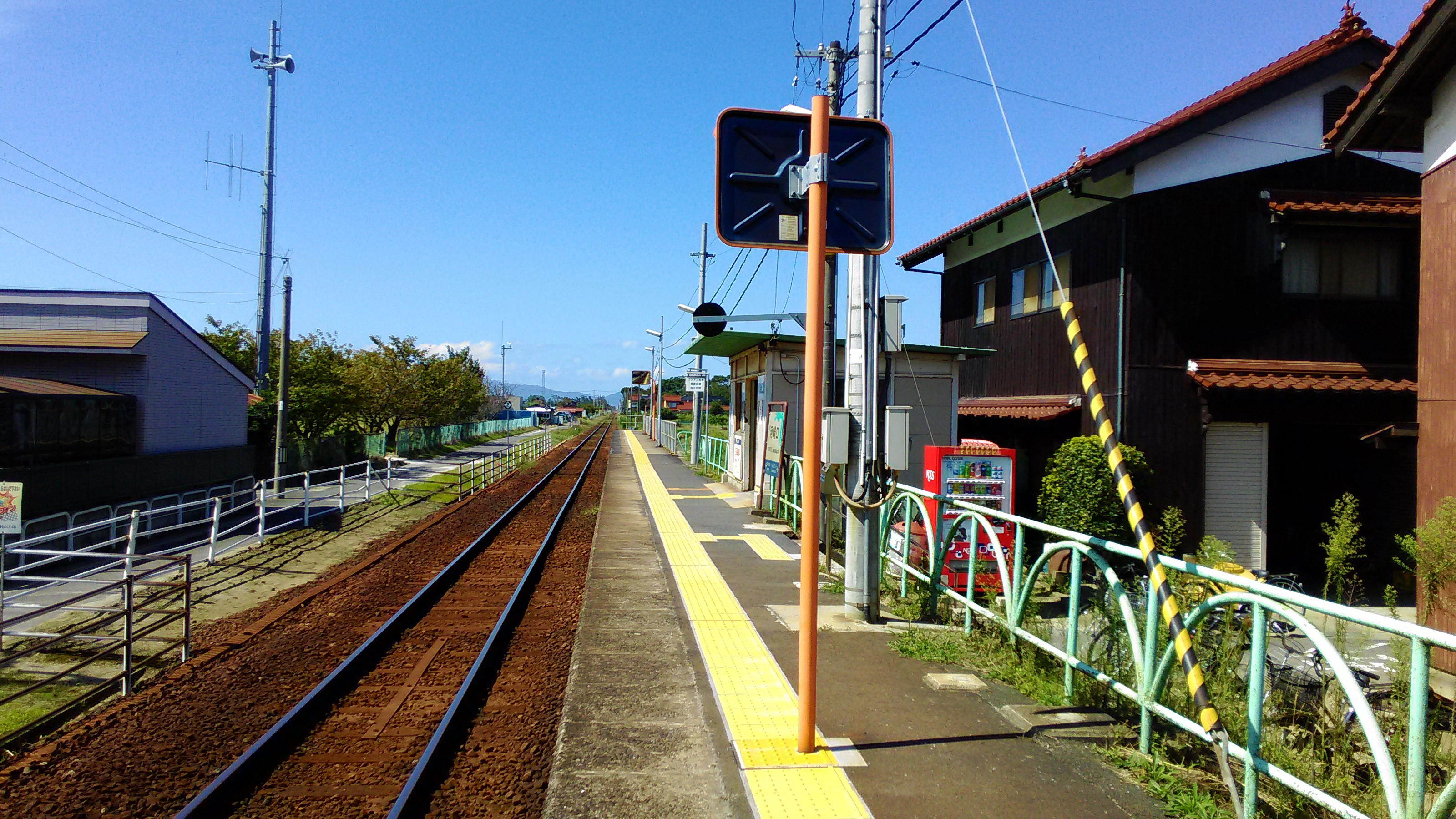 JR西日本境線河崎口駅